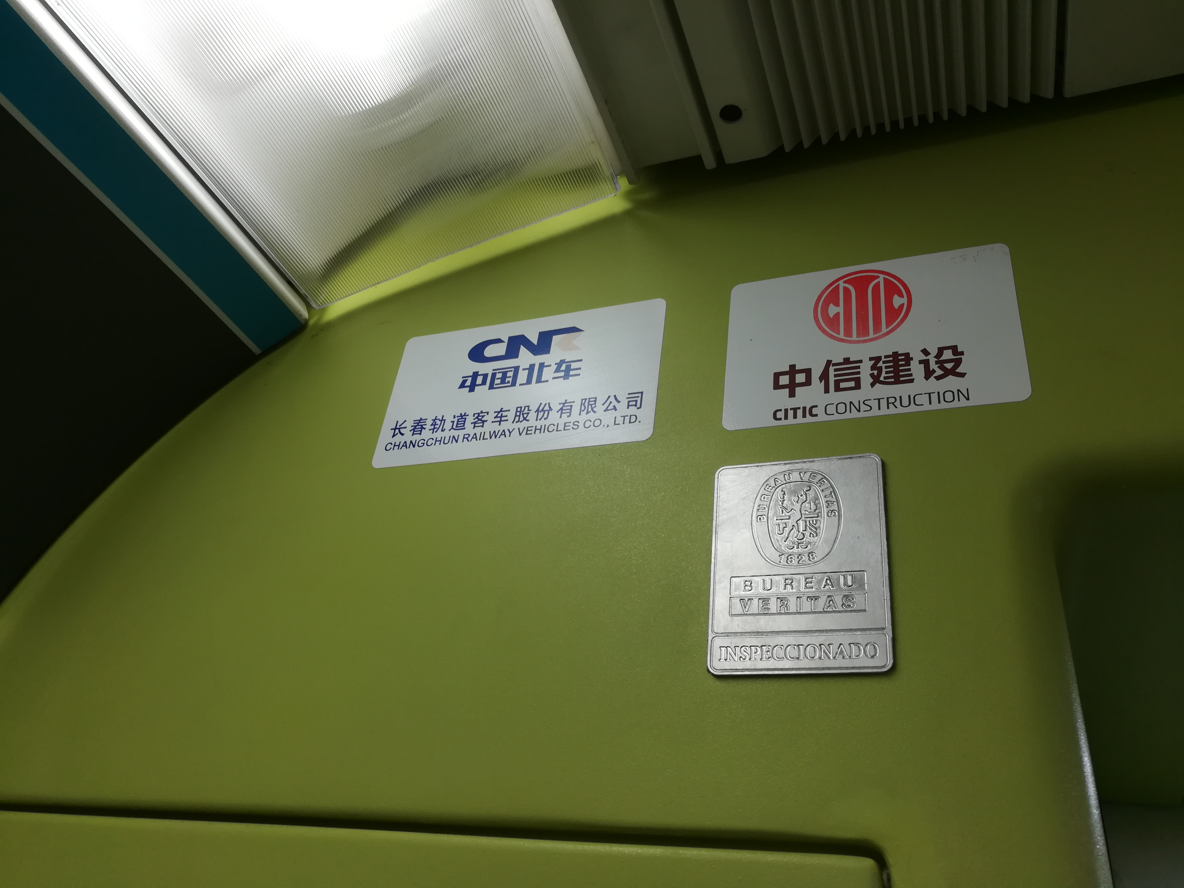 Placas del fabricante y de Bureau Veritas en los coches CNR CITIC Series 200 del subte de Buenos Aires